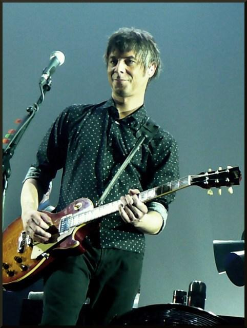 Boris Jardel à Amneville (photo de LysA)